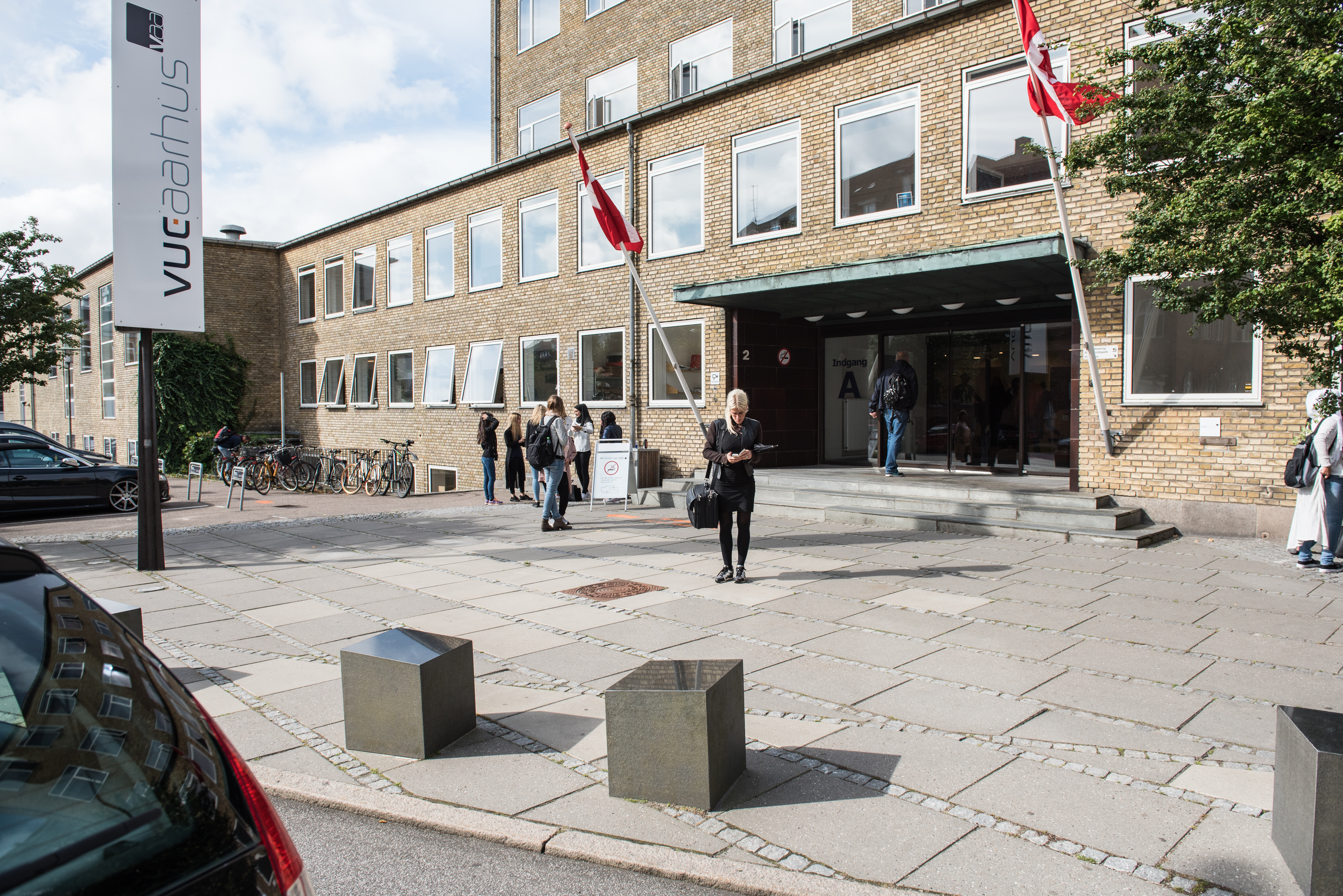 Dalgas Avenue 2 - hovedindgang og bygning C med bl.a. Festsal og kantine